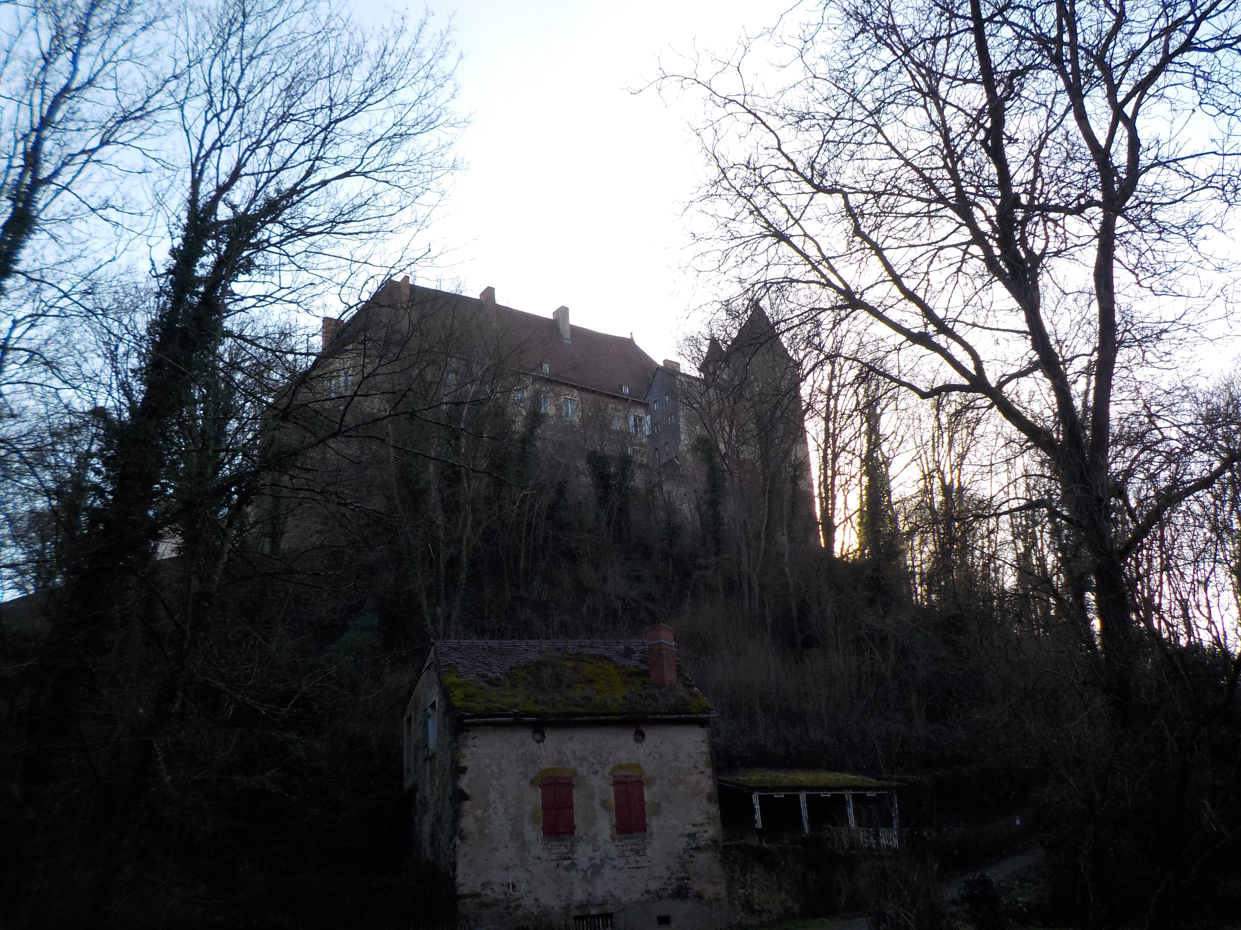 Vue en contre-plongée de l'abbaye depuis la forêt